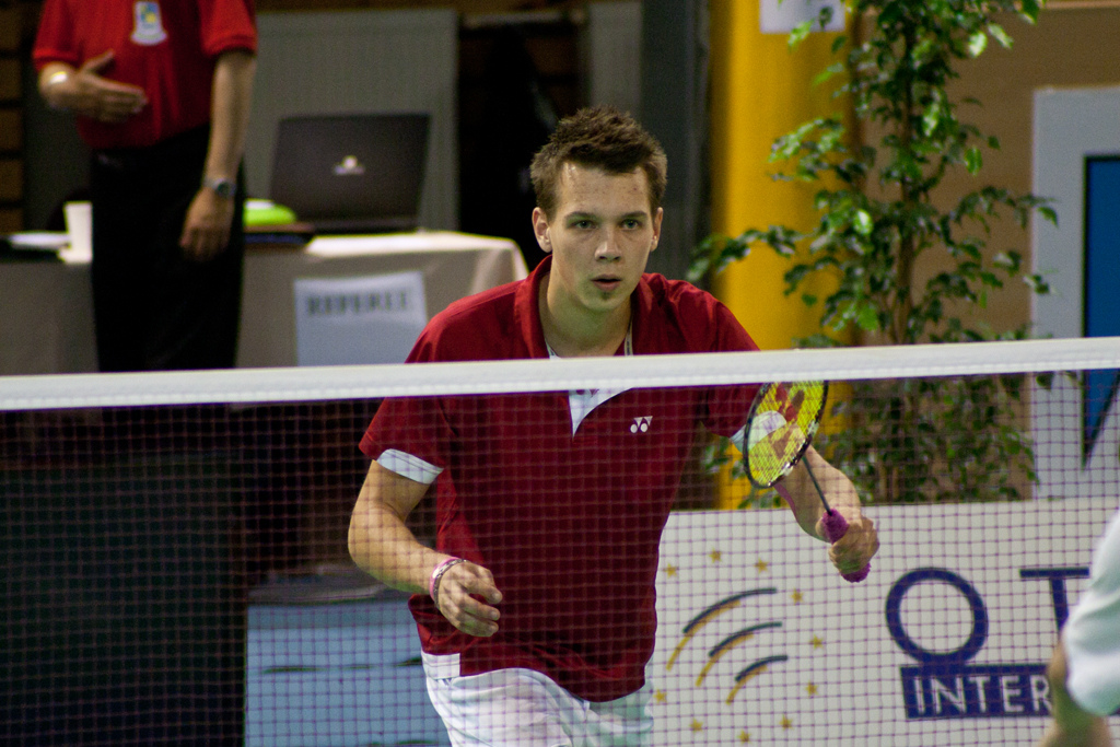 Mezinárodní mistrovství ČR v badmintonu